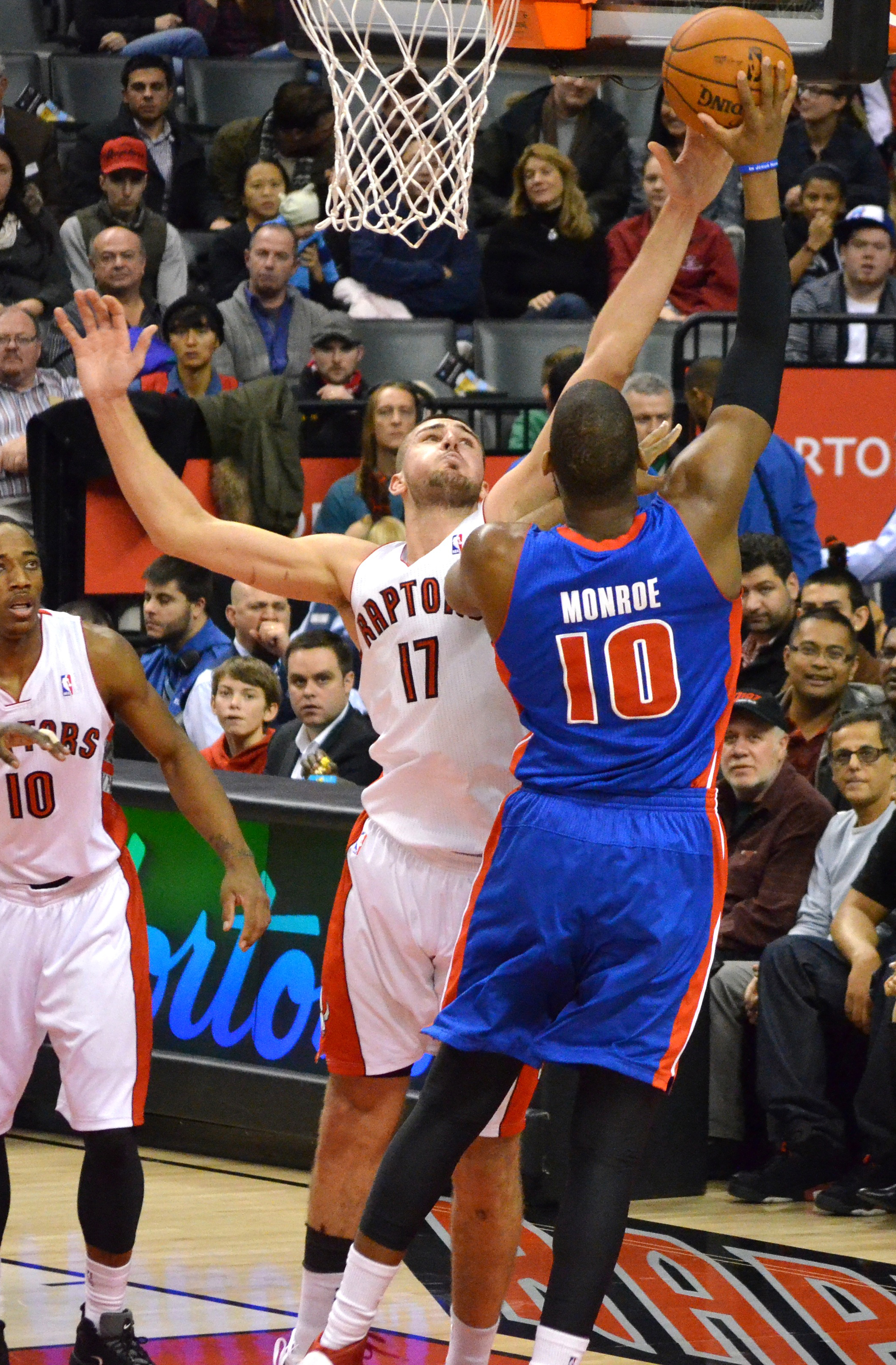 Greg Monroe Post Shot